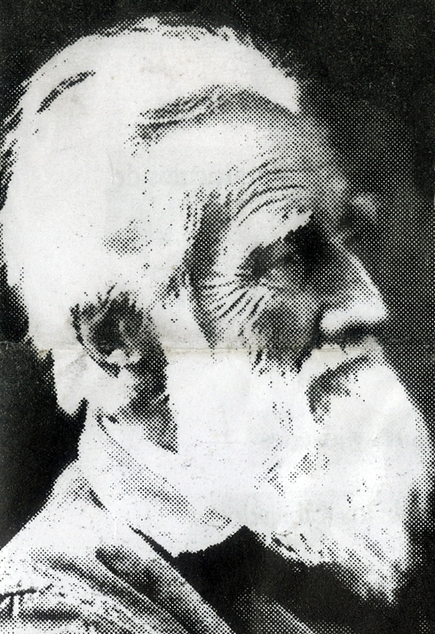 La imagen de Clotario Leopoldo Blest Riffo (Santiago, 17 de noviembre de 1899 - ibídem, 31 de mayo de 1990) fue un dirigente sindical chileno, fundador de diversas organizaciones, incluyendo la Agrupación Nacional de Empleados Fiscales (ANEF), la Central Única de Trabajadores (CUT), el Movimiento de Izquierda Revolucionaria (MIR) y el Comité de Defensa de Derechos Humanos y Sindicales (CODEHS). ""